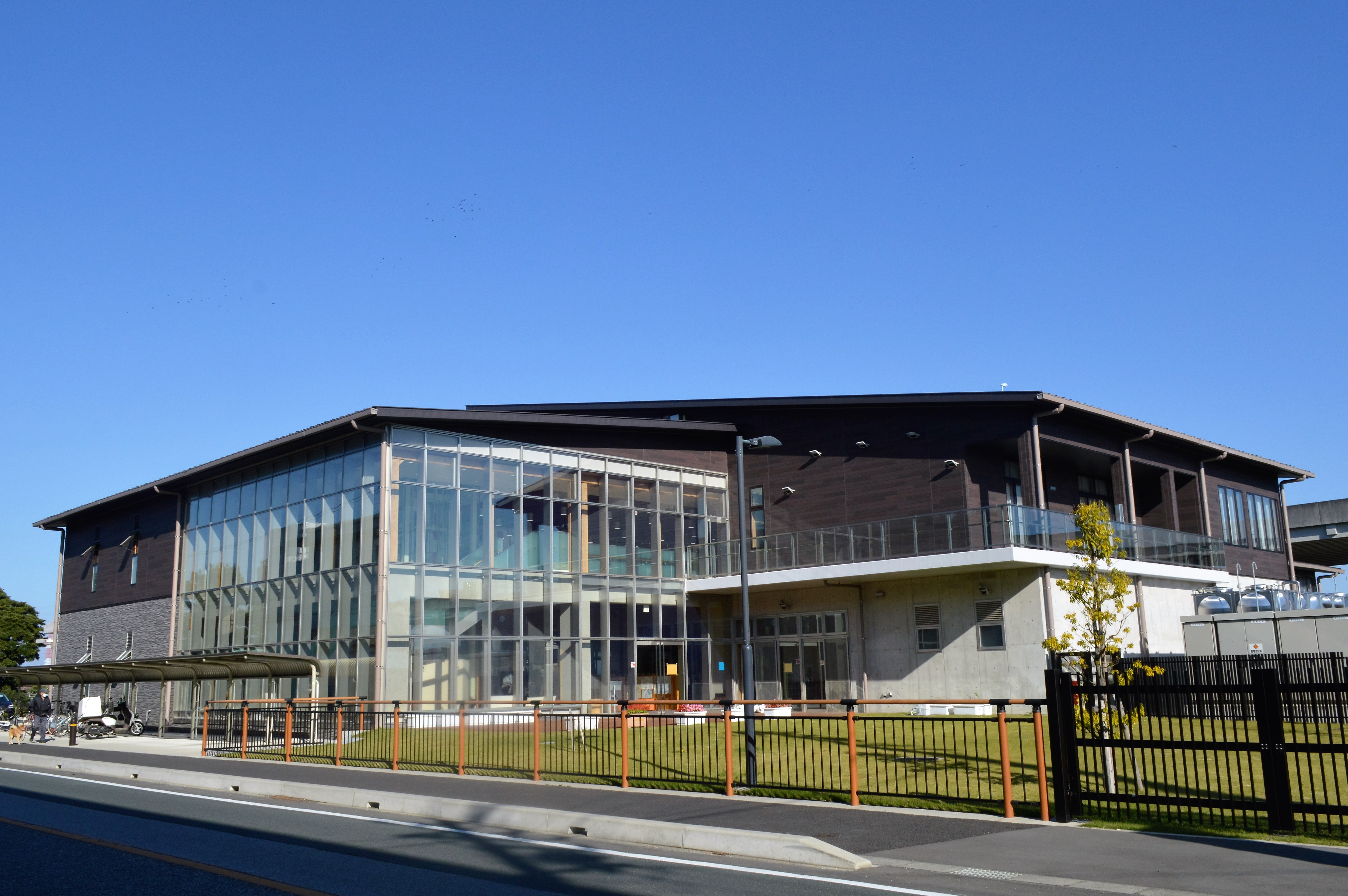 豊橋市大清水まなび交流館「ミナクル」。豊橋市大清水図書館などが入る複合施設。